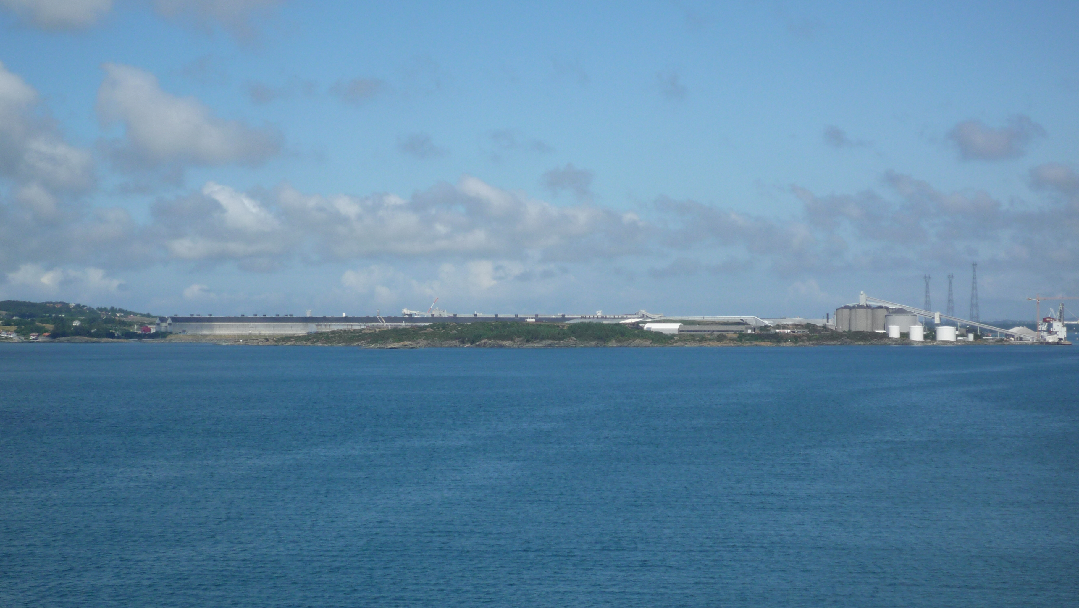 Hydro Aluminium Karmøy sett frå Karmsundet på veg nordover